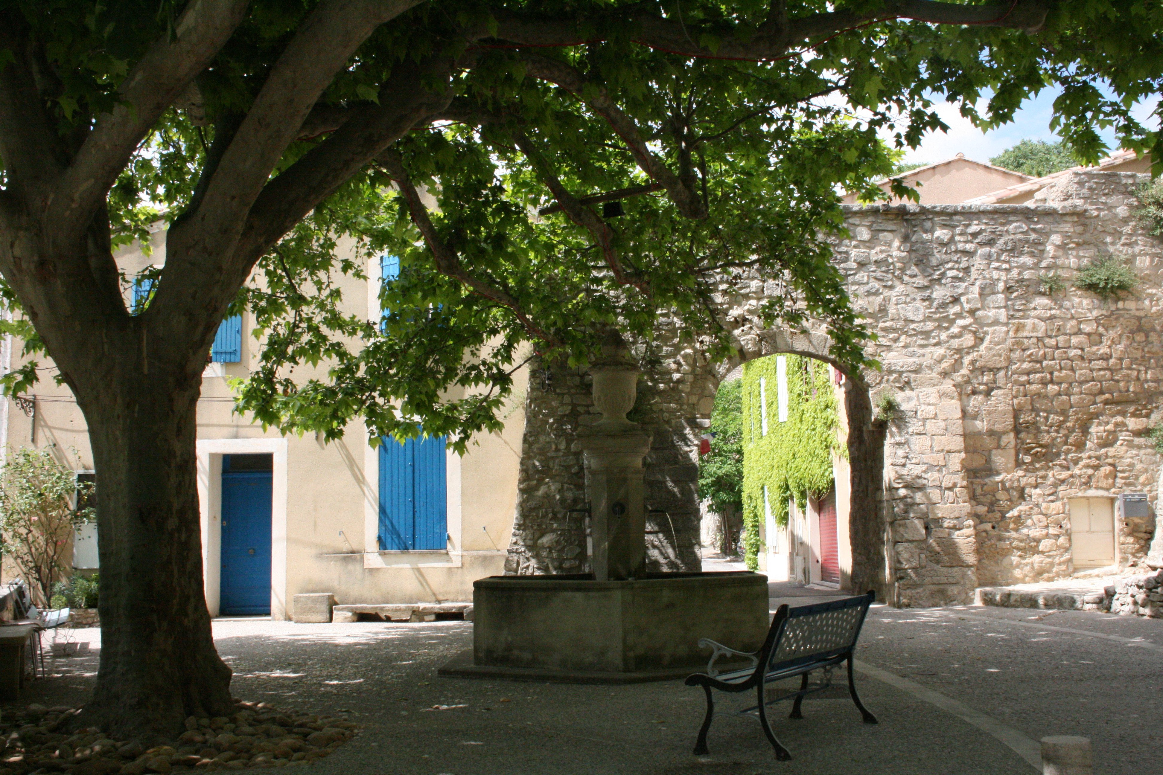 Le Beaucet, département du Vaucluse (France). Porte du village médiéval